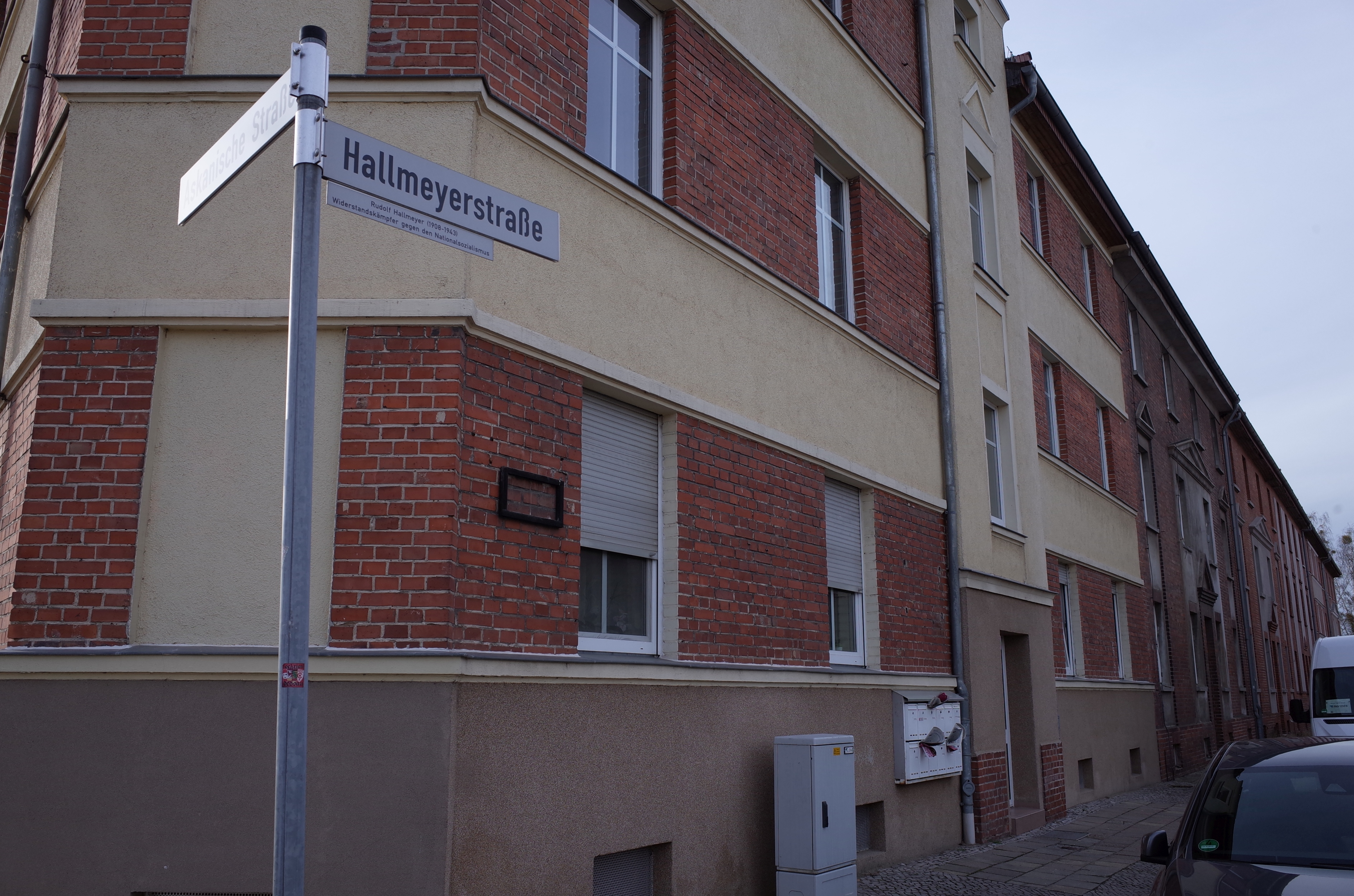 Dessau-Roßlau, Straßenschild Hallmeyerstraße